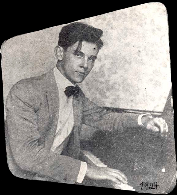 Radamés Gnattali, arranjador, compositor, e instrumentista brasileiro.